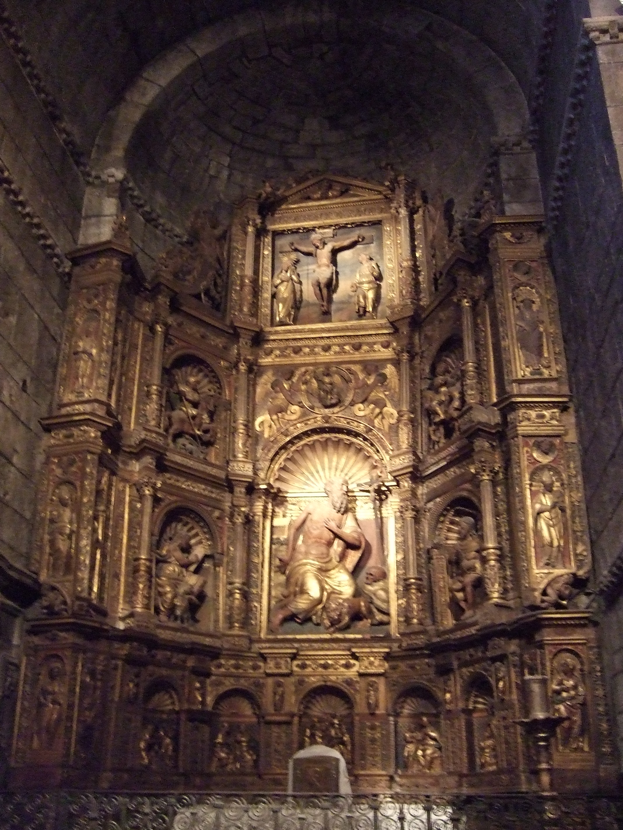 Jaca - Catedral - Interior - Retablo